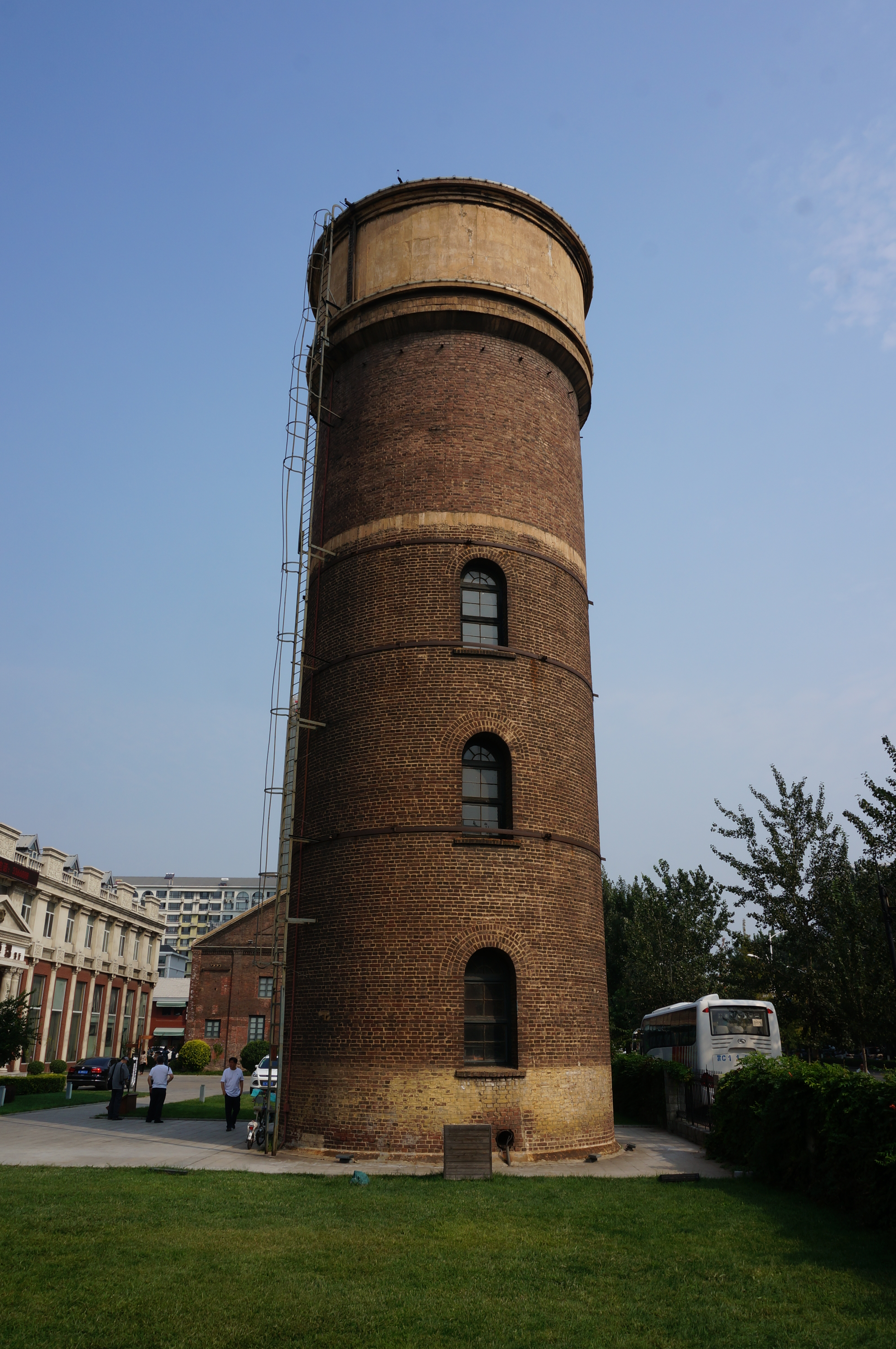 秦皇岛耀华玻璃厂旧址，水塔，南侧。